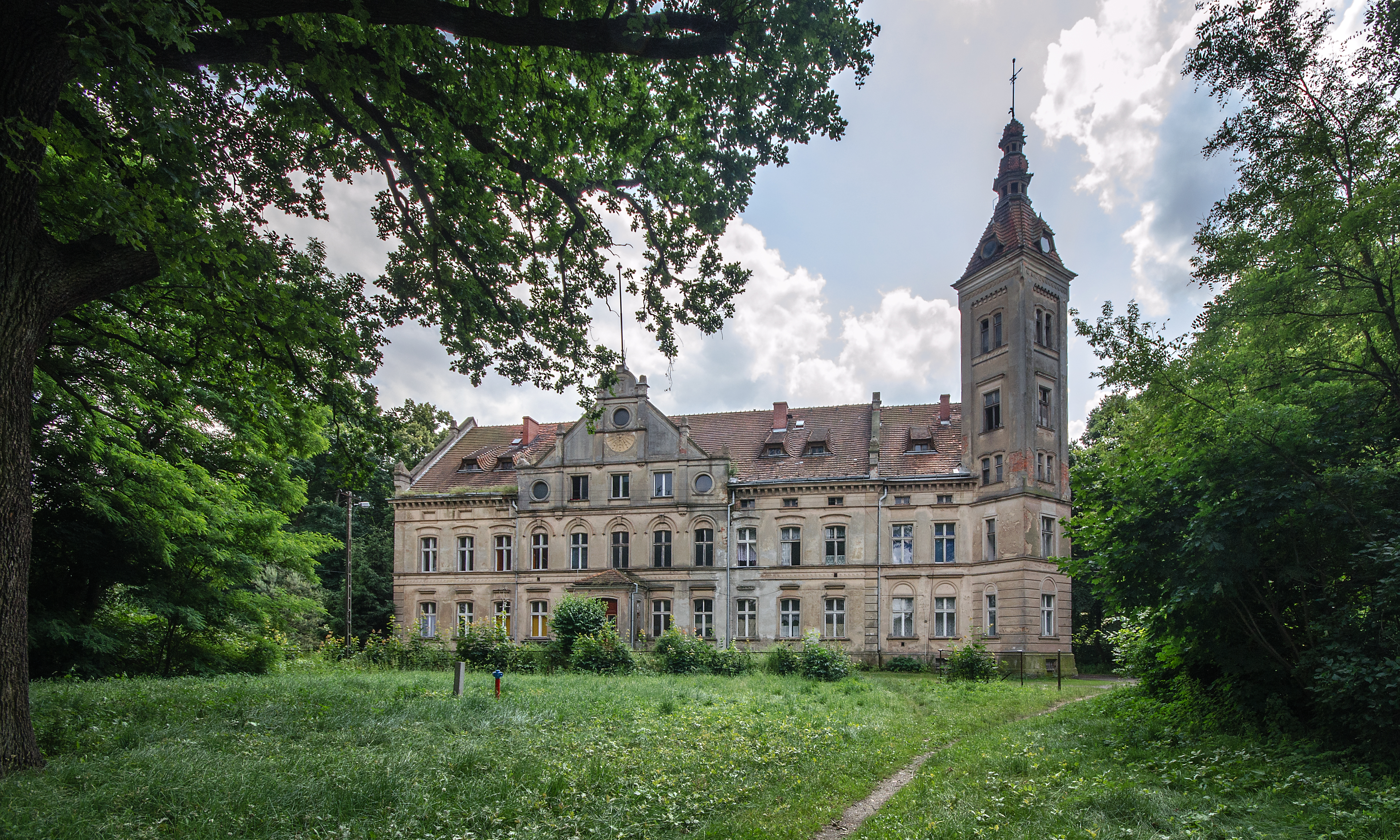 Jędrzychów 9f, pałac, XIX, 1903